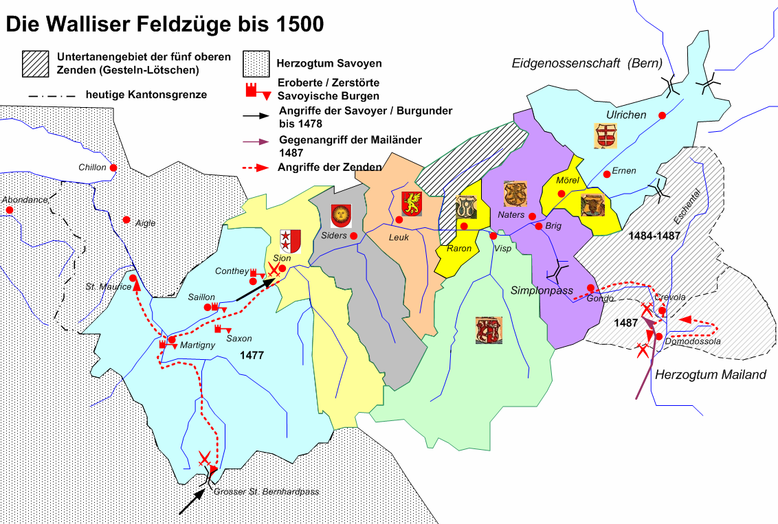 Die Feldzüge der Walliser bis 1500